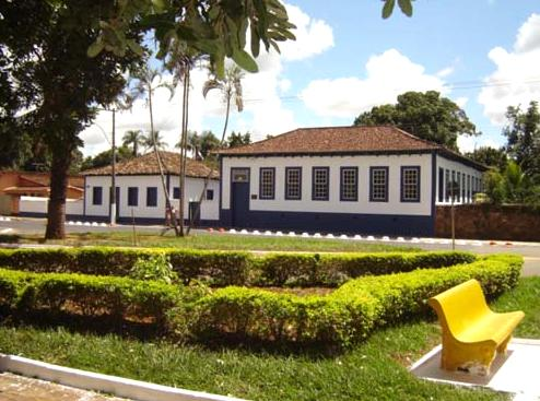 Casarão de Hermenegildo de Morais